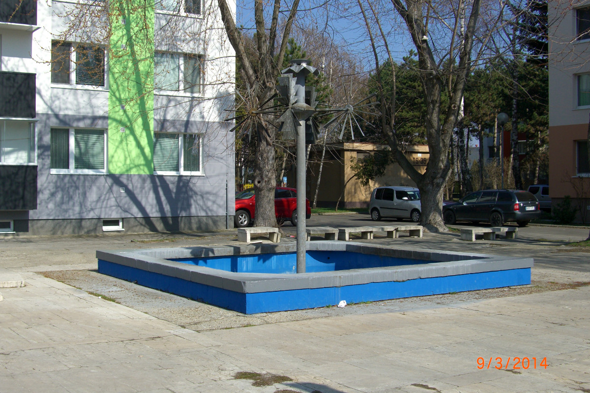 Fontana Vodna ruza, Bratislava/Ruzinov/Posen